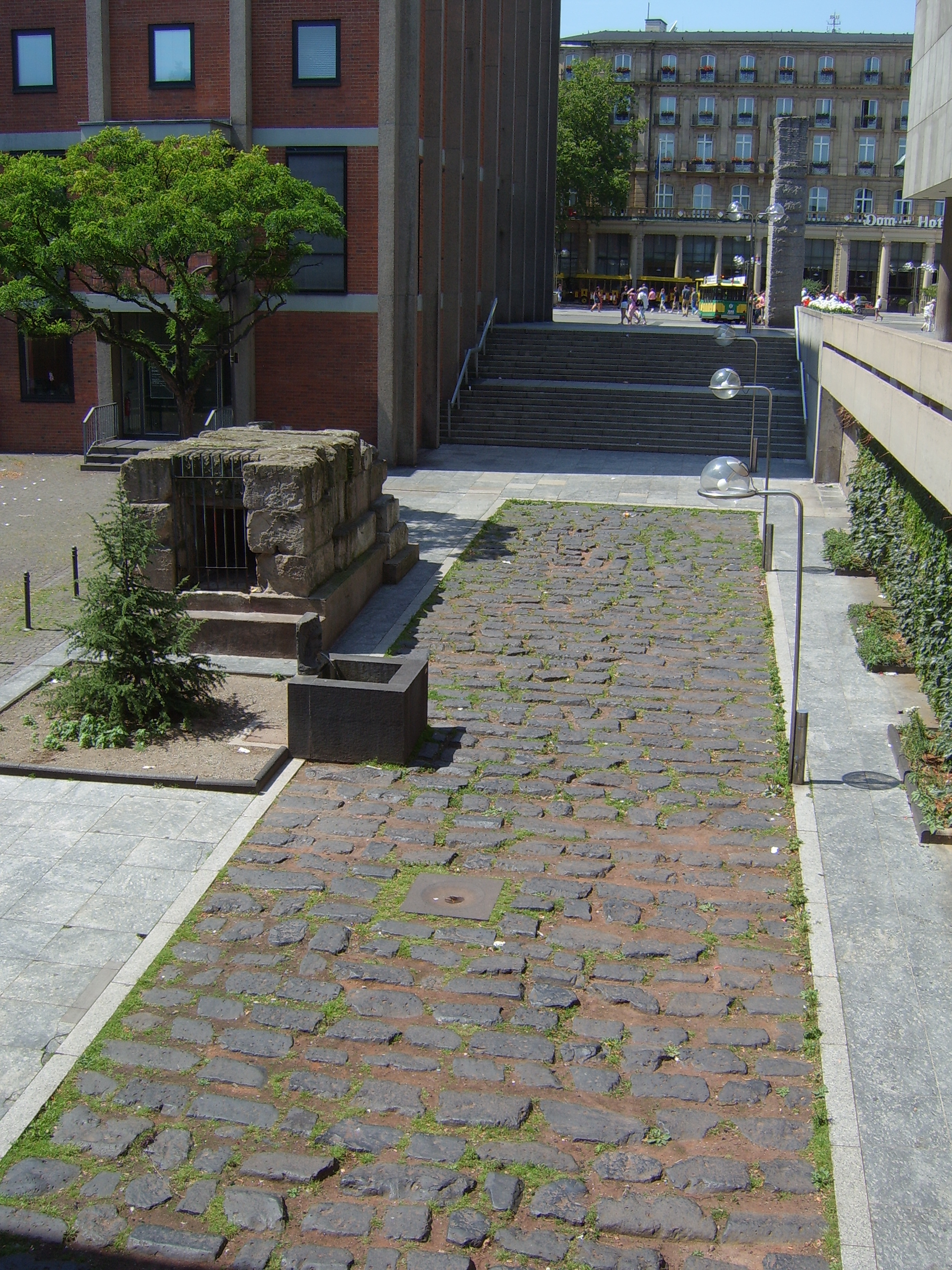 Blick auf die röm. Hafenstraße (2. Jh.)